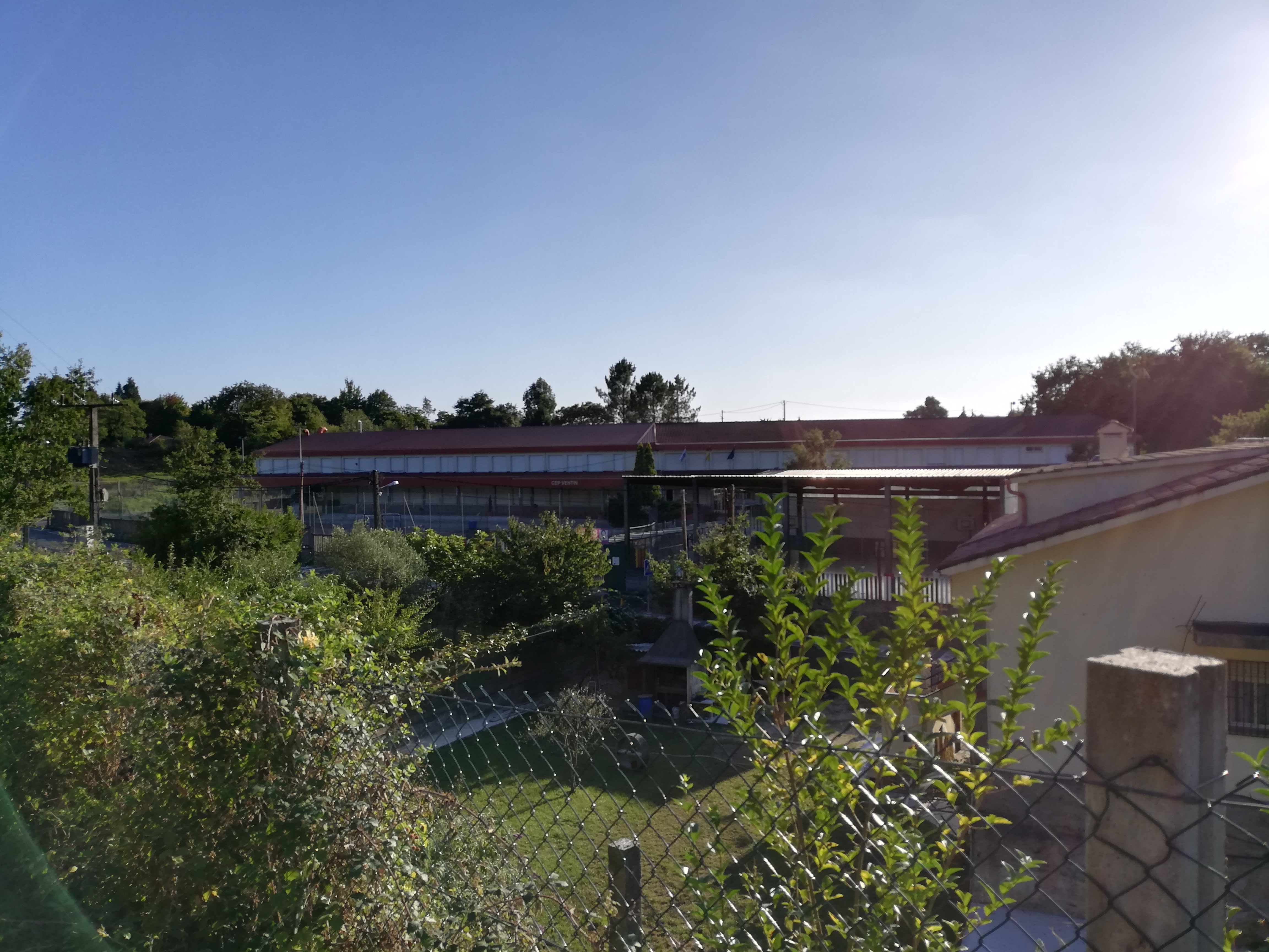 Vista do lugar de Ventín, na parroquia de Biduído, en Ames.